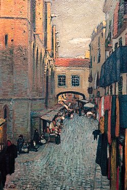 "Carrer de Santa Maria", pintura del artista catalán Ramon Pichot i Gironès. Colección BBVA